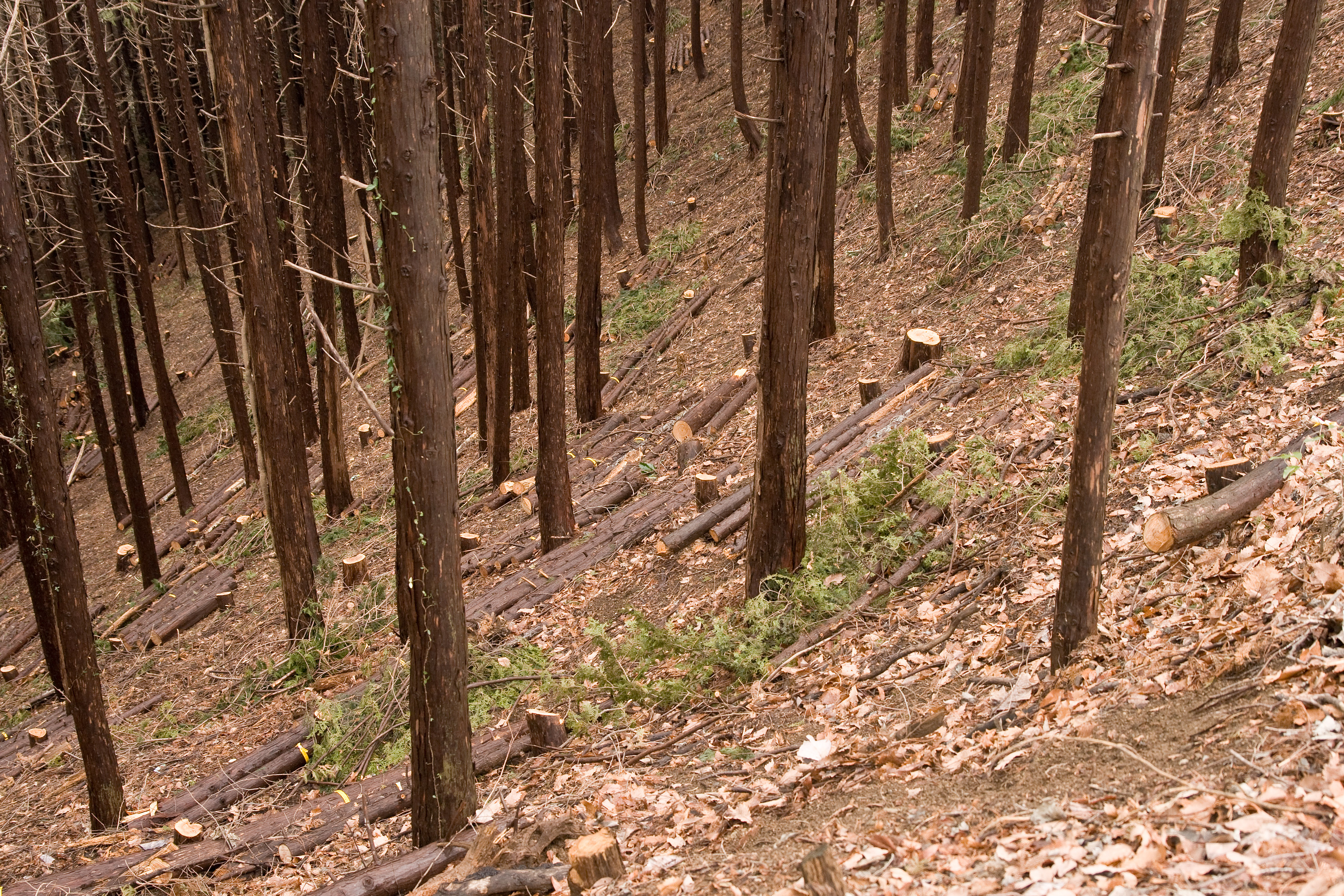 スギ (学名:Cryptomeria japonica)